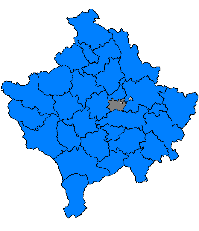 Kosovo Polje (Косово Поље) map, Kosovo 2006